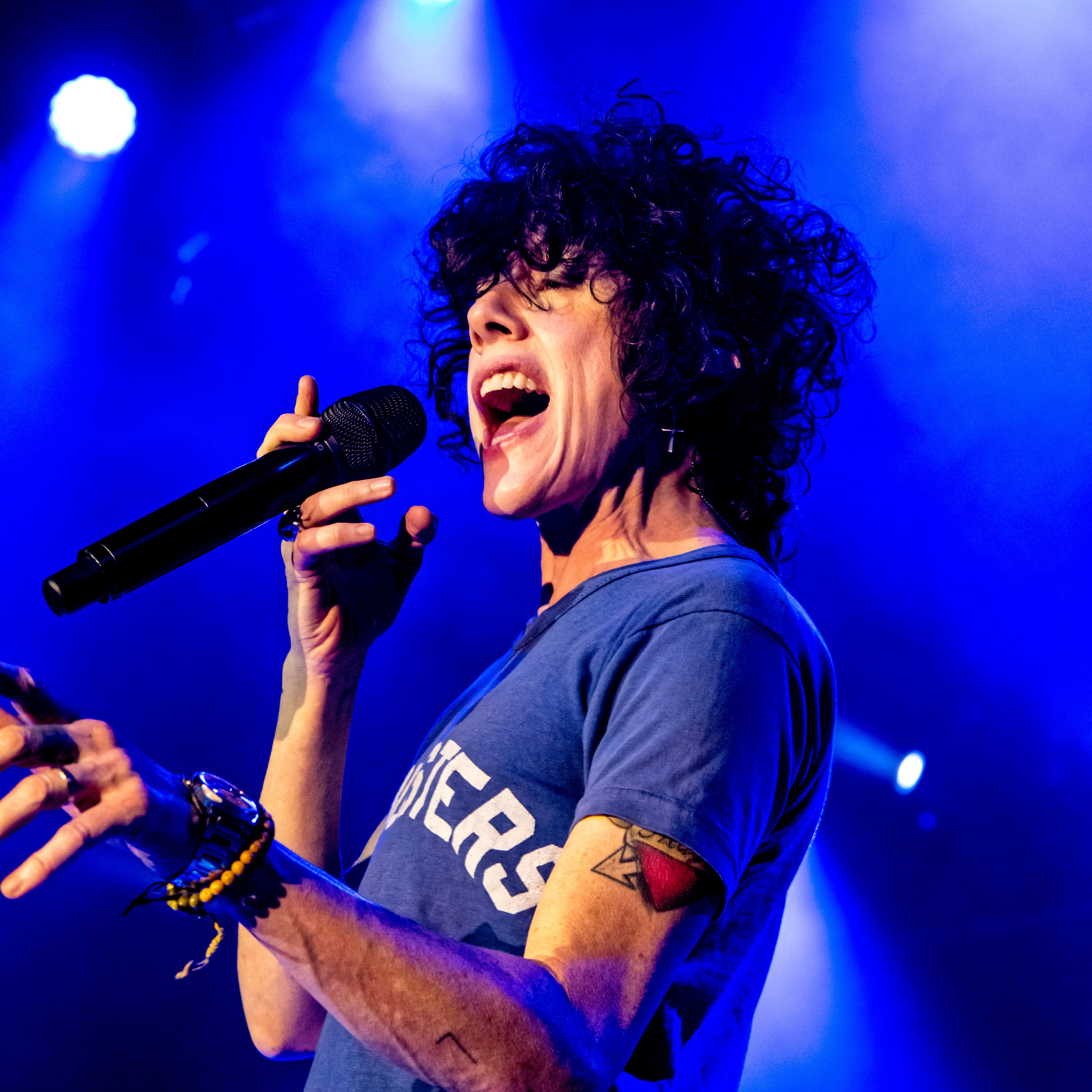 Bilder vom Zelt Musik Festival 2018 in Freiburg im Breisgau LP am 28.07.2018 im Zirkuszelt